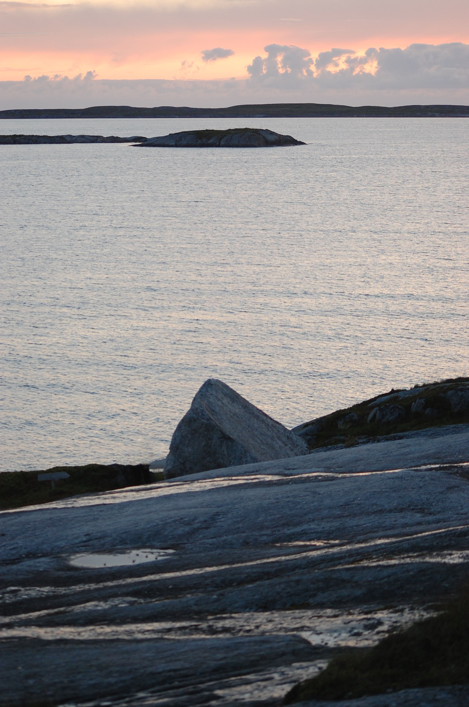 En stein som kan settes i bevegelse